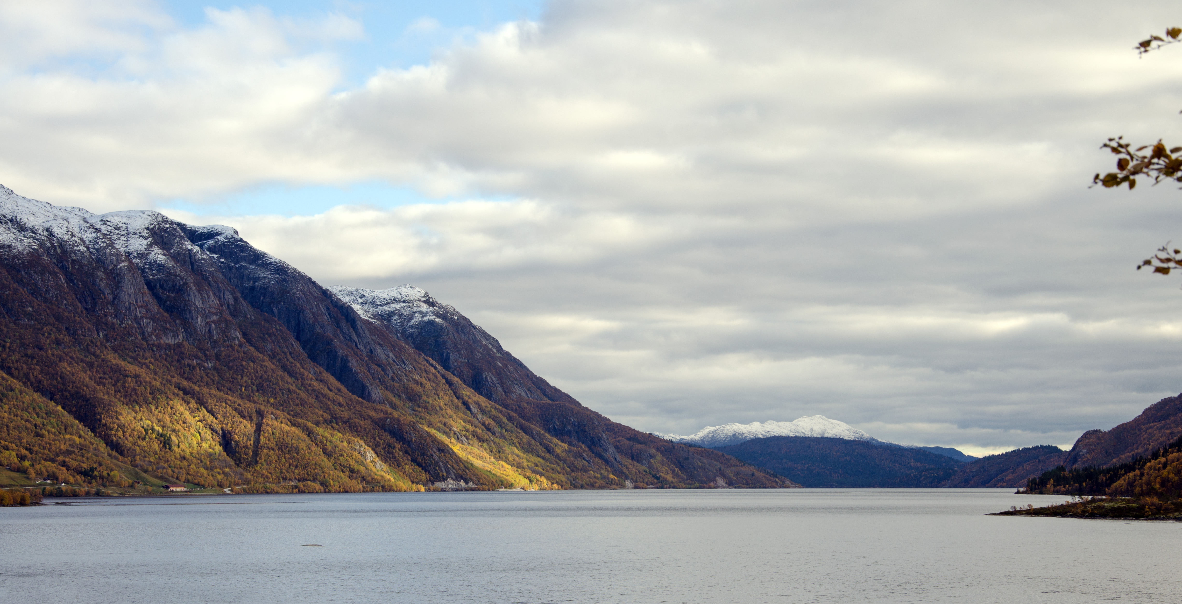 Totak